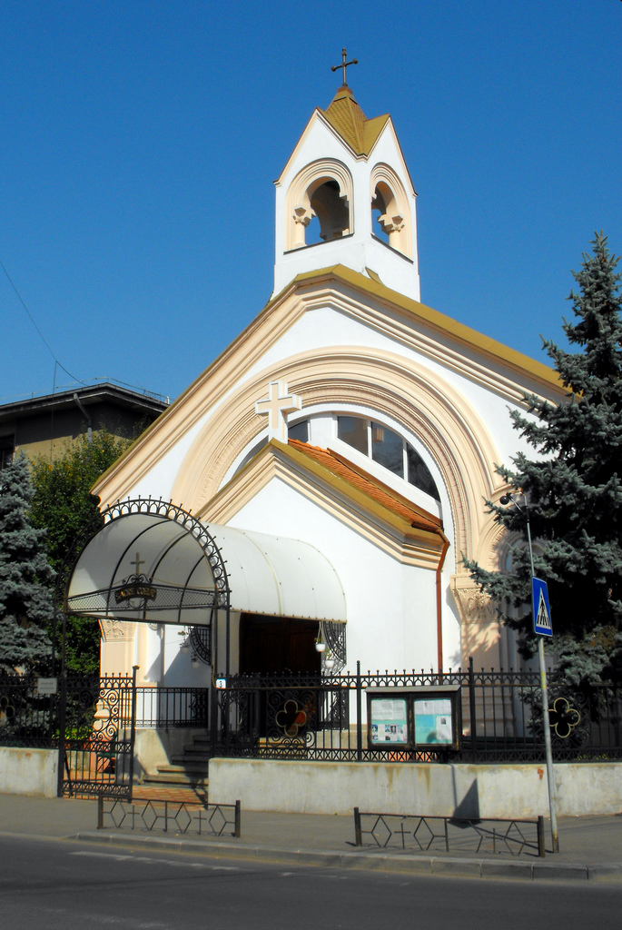 SACRE COEUR de Bucarest